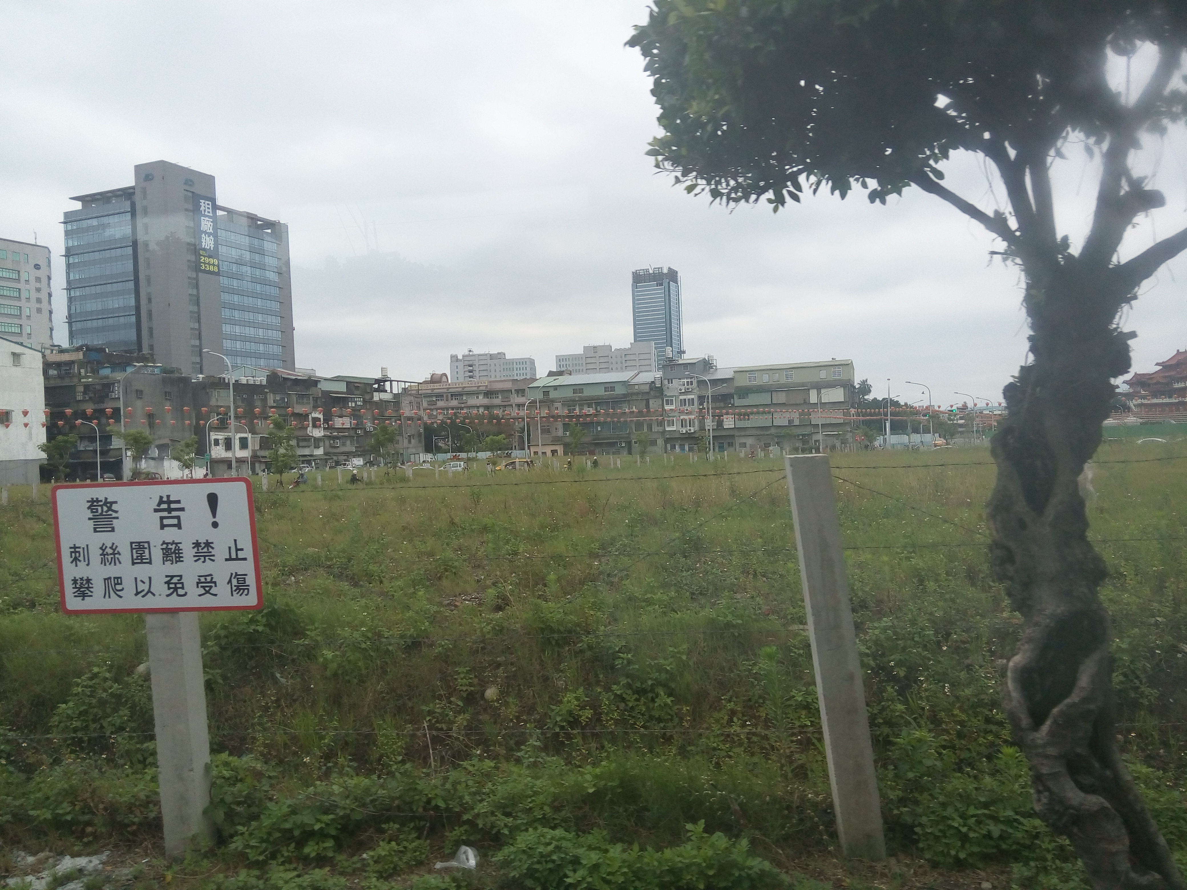 中文（台灣）: 頂新三重新燕案土地。先嗇宮附近的地被圍起刺網，不准閒人進入。